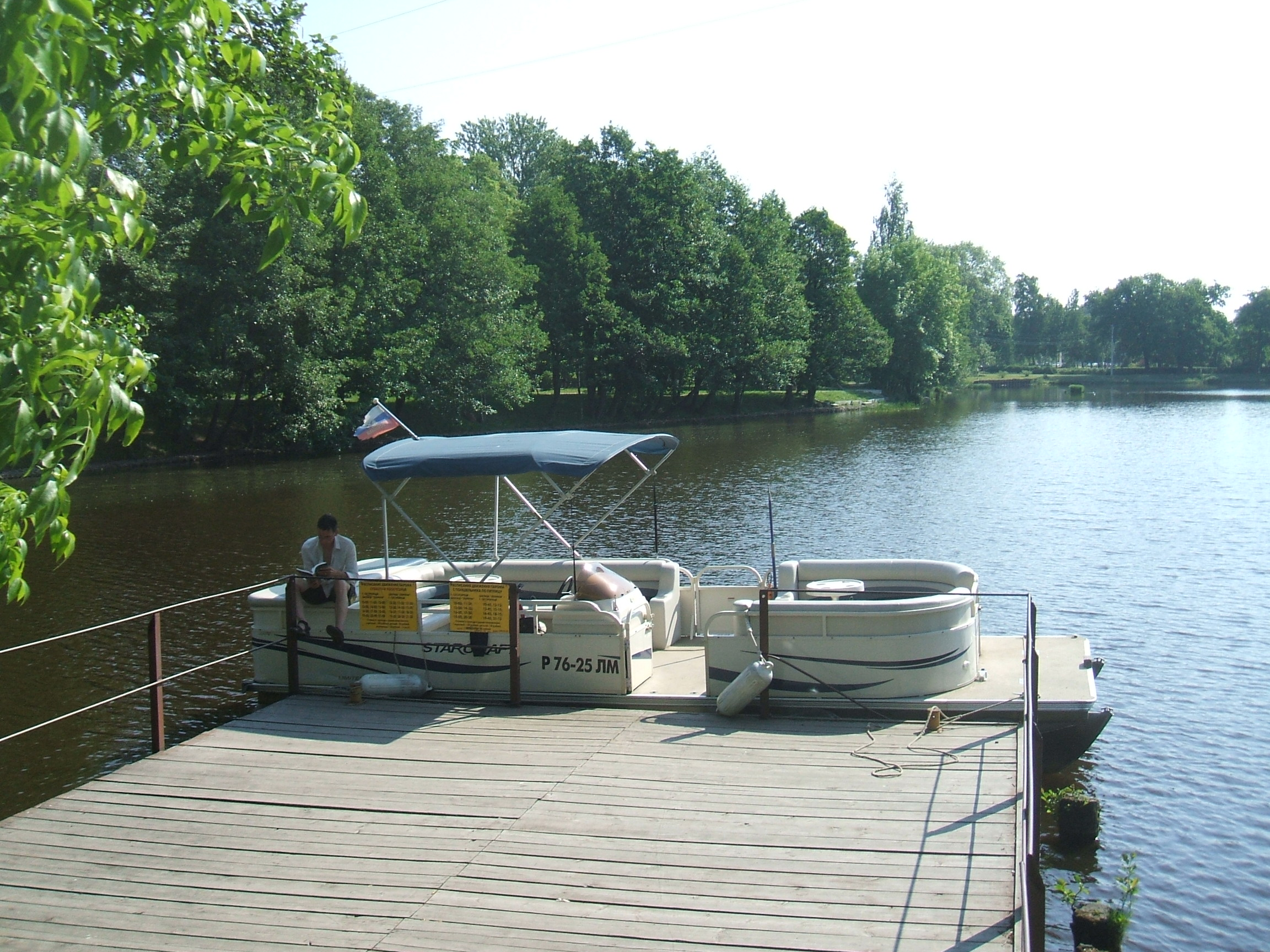 Сестрорецкий Разлив речной транспорт к Шалашу